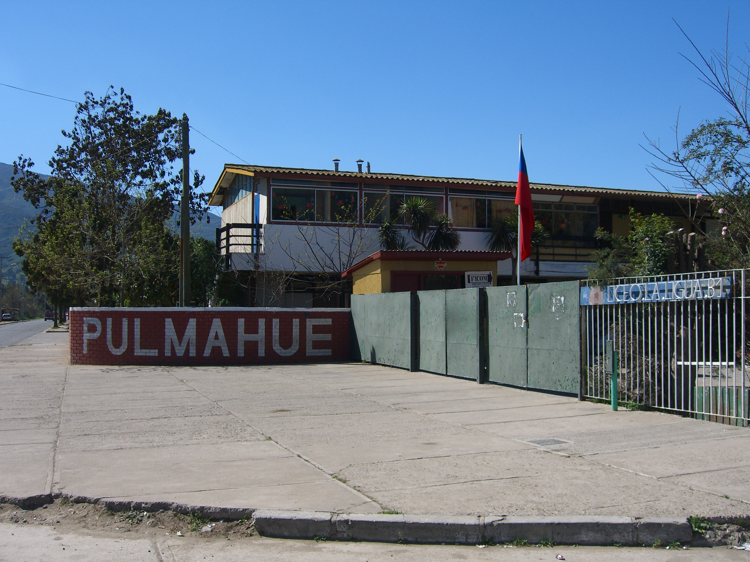 Liceo "Pulmahue" Municipal de La Ligua, Chile. Öffentliche Schule "Pulmahue" in La Ligua, Chile